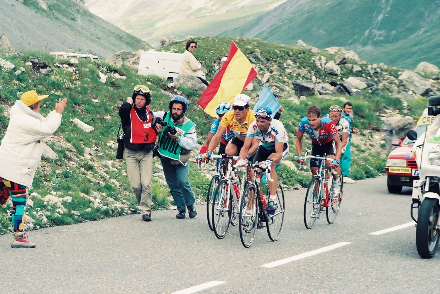 Montée du col du Galibier lors du Tour de France 1993. De gauche à droite, le Colombien Álvaro Mejía (caché), le maillot jaune espagnol Miguel Indurain, le Suisse Tony Rominger, l'Américain Andy Hampsten et le Polonais Zenon Jaskuła.